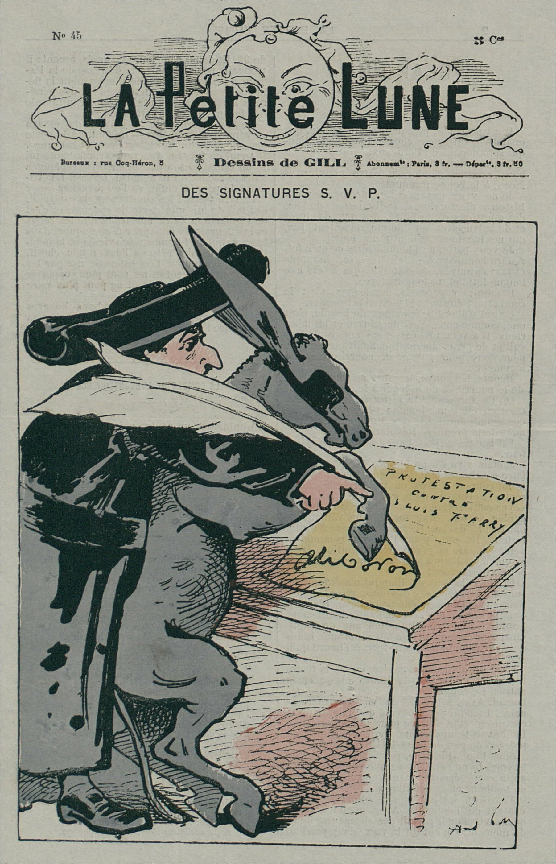 La Petite Lune n°45 : « Des signatures S. V. P. » Un prêtre fait signer à un âne sous le nom d'Aliboron une protestation contre les lois Ferry.